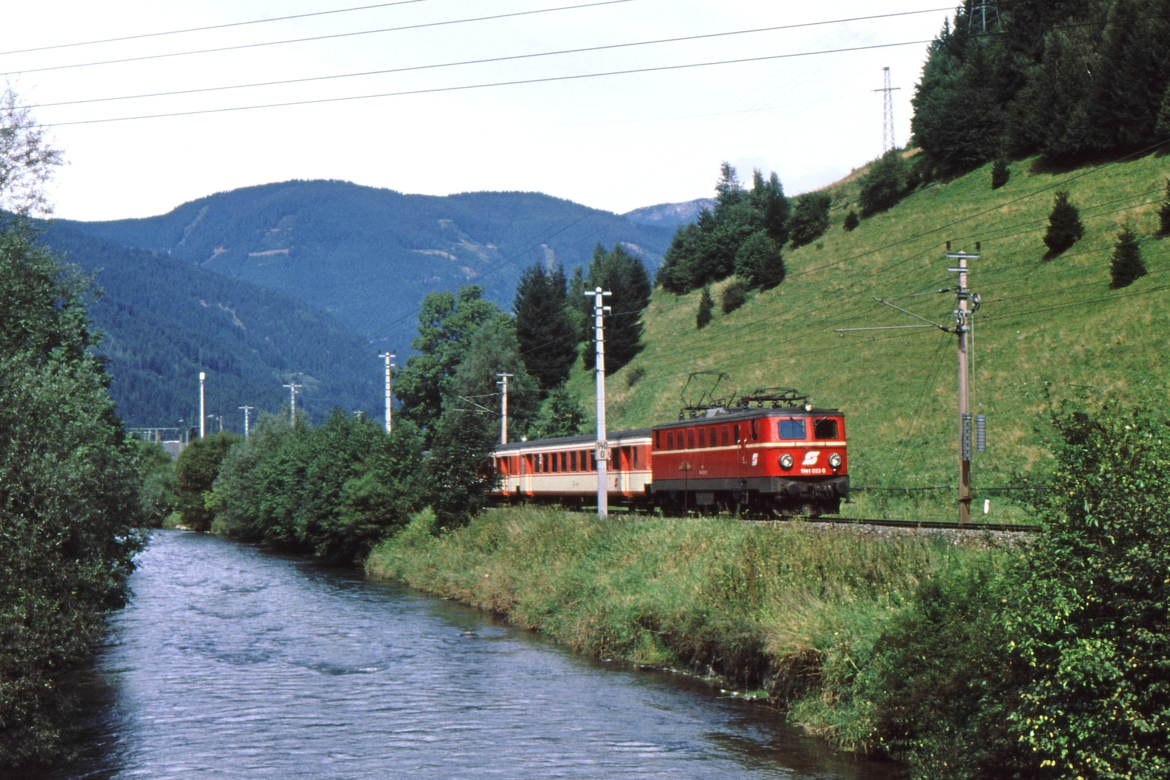 A - ÖBB - 3.1. 1141 023-0 - 1994-08-18 - Selzthal